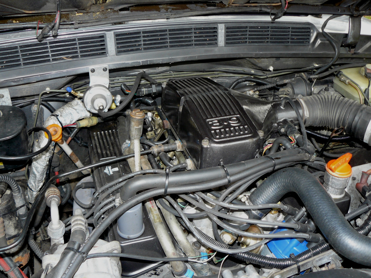 Range Rover 3.9 V8 engine